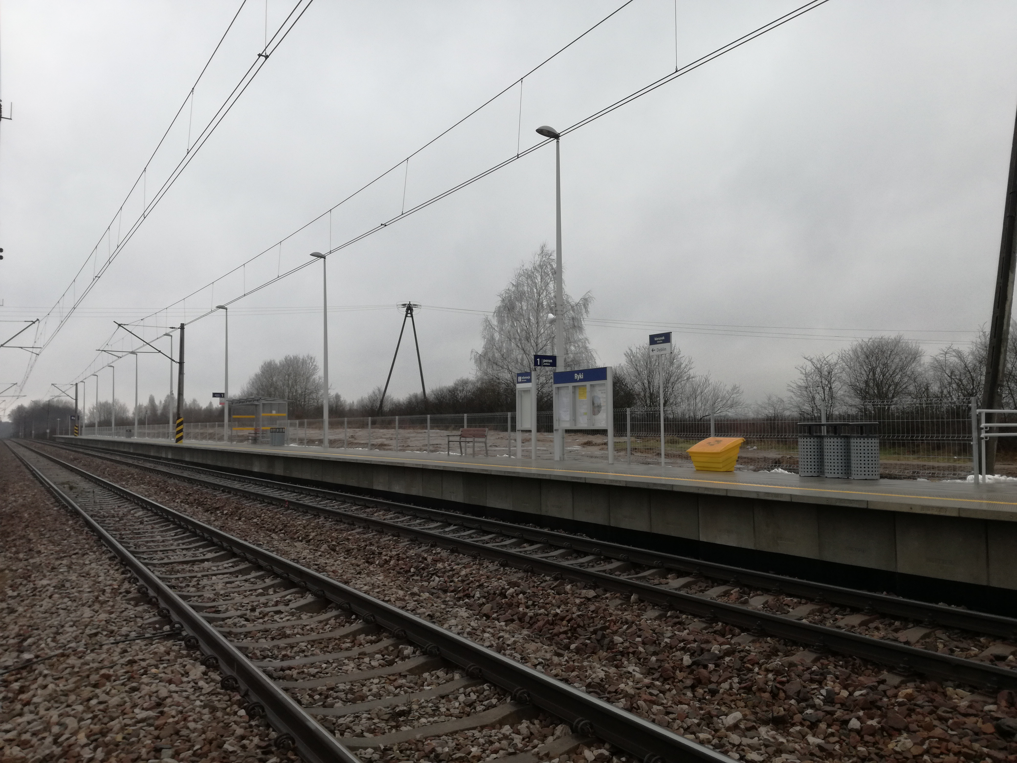 Przystanek kolejowy Ryki, wybudowany w 2017 roku